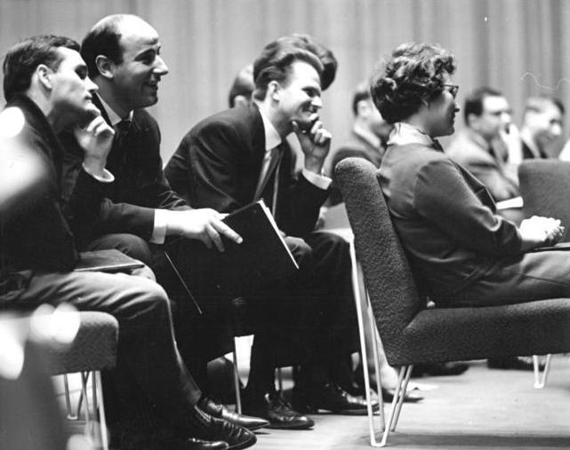 Zentralbild-Eckleben Ge-Qu 11.4.1963 2. Lyrikabend in Berlin Zu einem großen Erlebnis wurde auch der 2. Lyrikabend in Berlin am 10.4.1963 im ausverkauften Filmtheater Kosmos, der anläßlich des bevorstehenden VII. Parlaments der FDJ und der Delegiertenkonferenz des Deutschen Schriftstellerverbandes stattfand. UBz. Auch sie sind interessierte Zuhörer: der junge Lyriker Klaus Wolf, Schauspieler Manfred Krug und Lyrikerin Rose Nyland (v.l.n.r.).